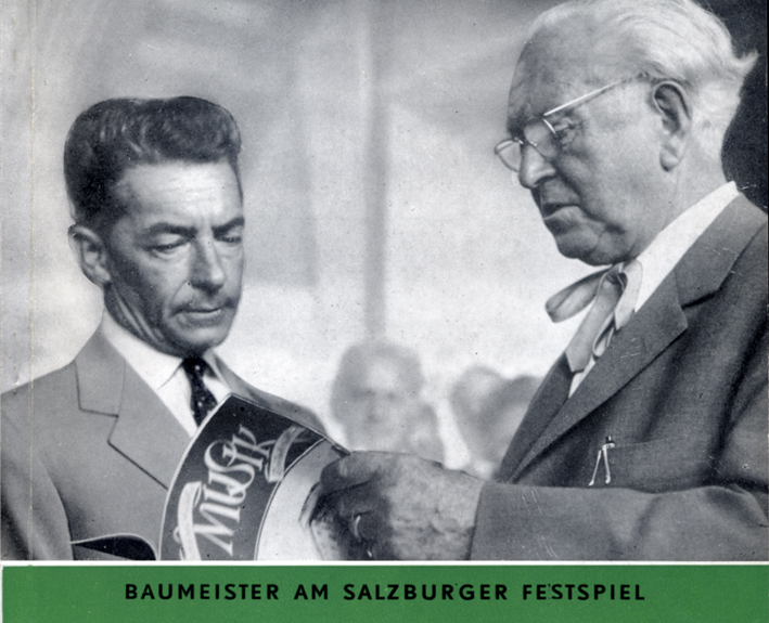 Herbert von Karajan und Clemens Holzmeiser blicken auf Peter Lafites Zeitschrift